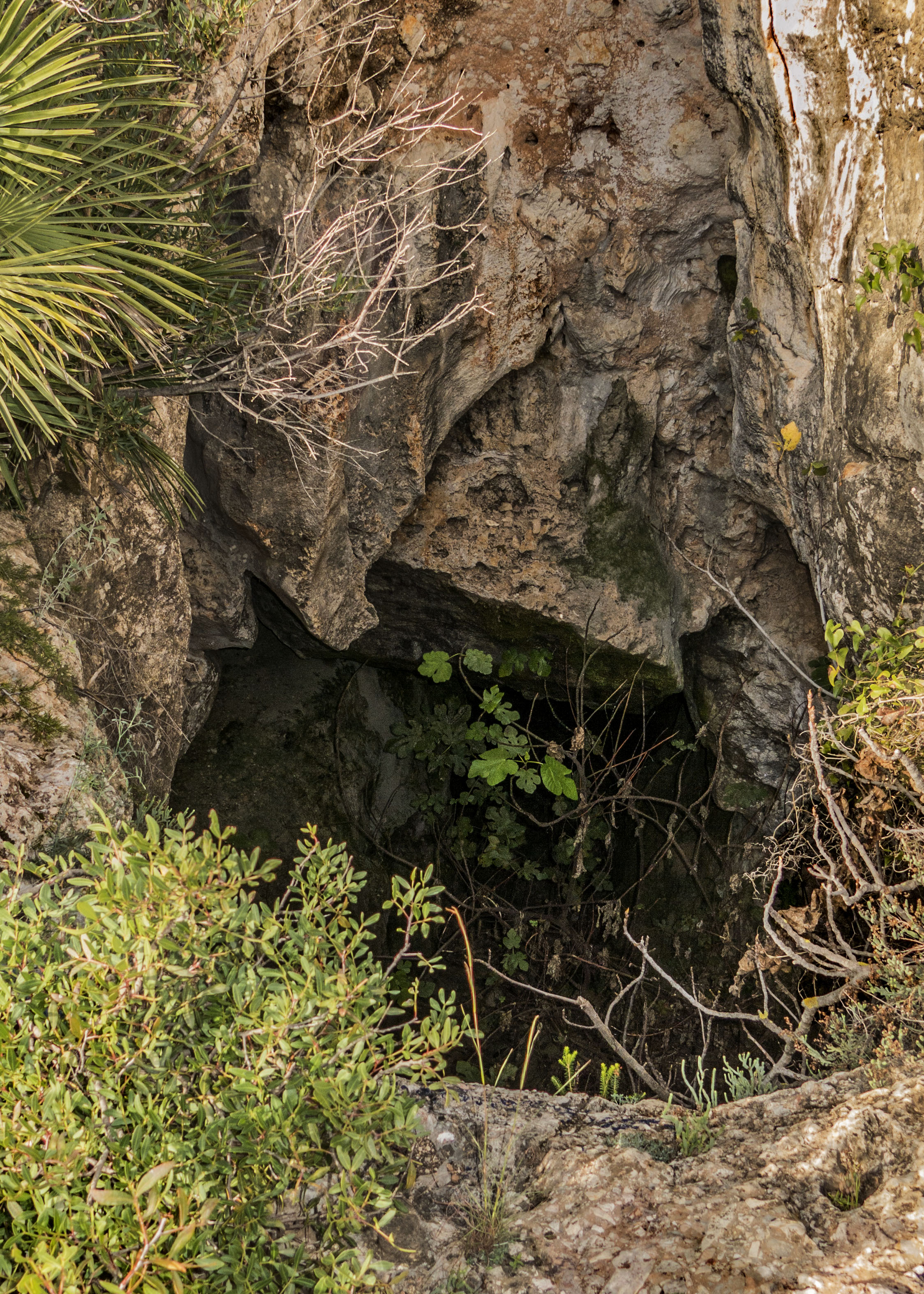 Entrada de l'Avenc de l'Infern (o Cova de Primo), situat al sud del Quencall, Matamon.